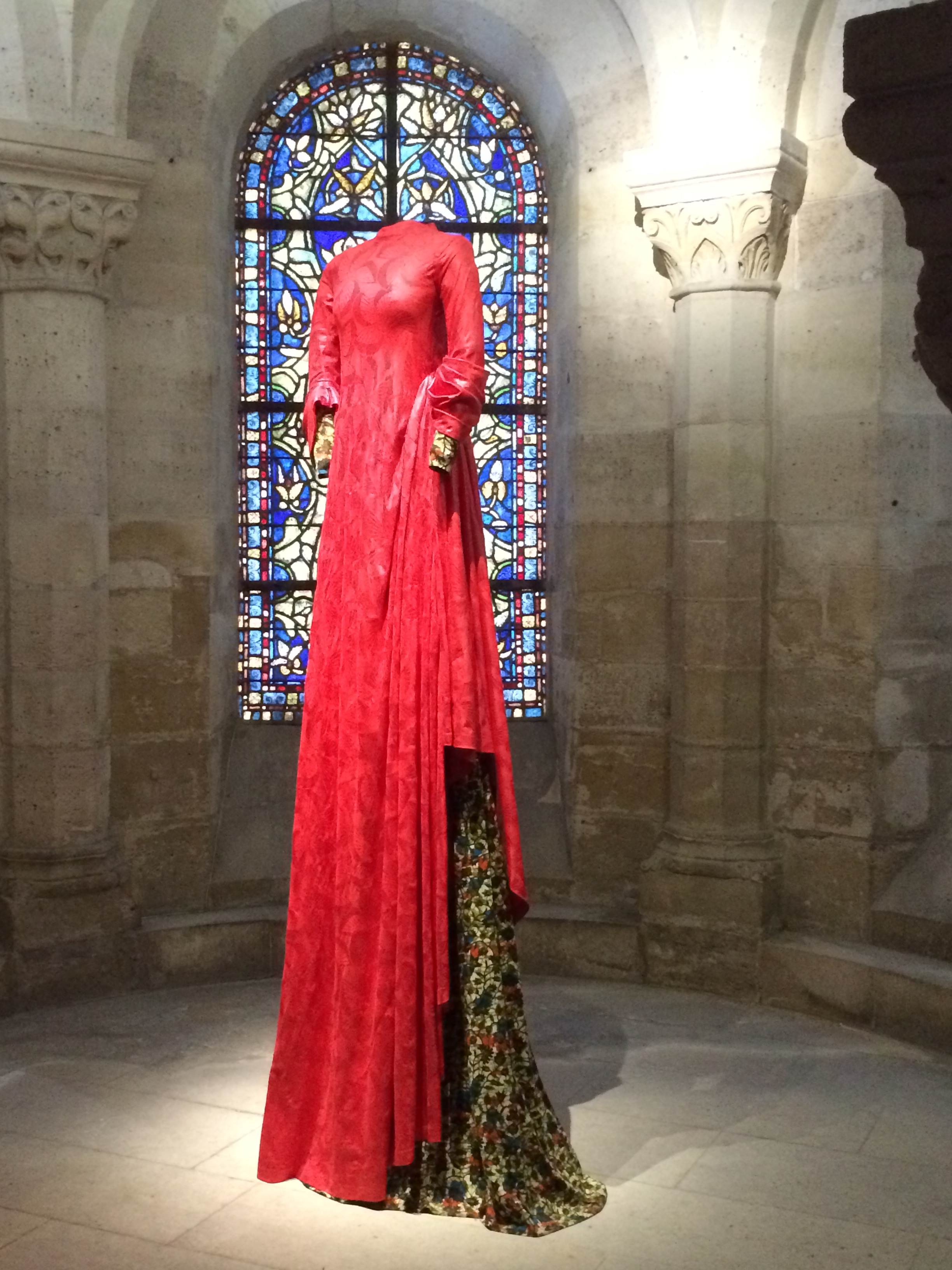 Une des grandes robes royales dessinées et réalisées par Lamyne M. et exposées à la Basilique Saint-Denis en 2015 et 2016.